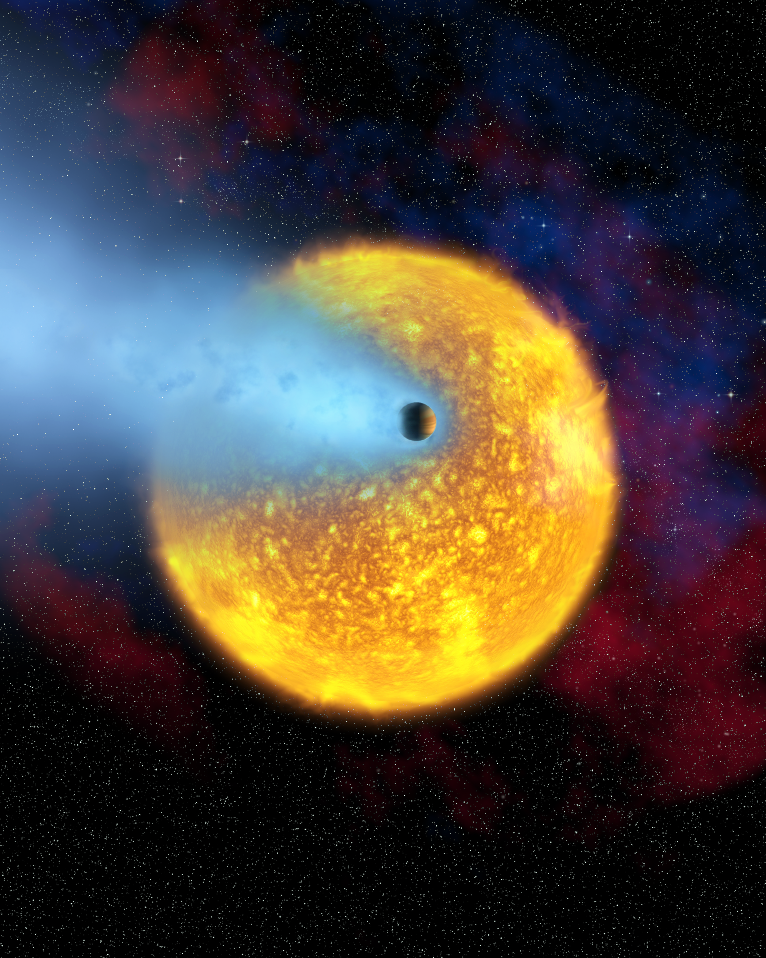 Transiting HD 209458 b